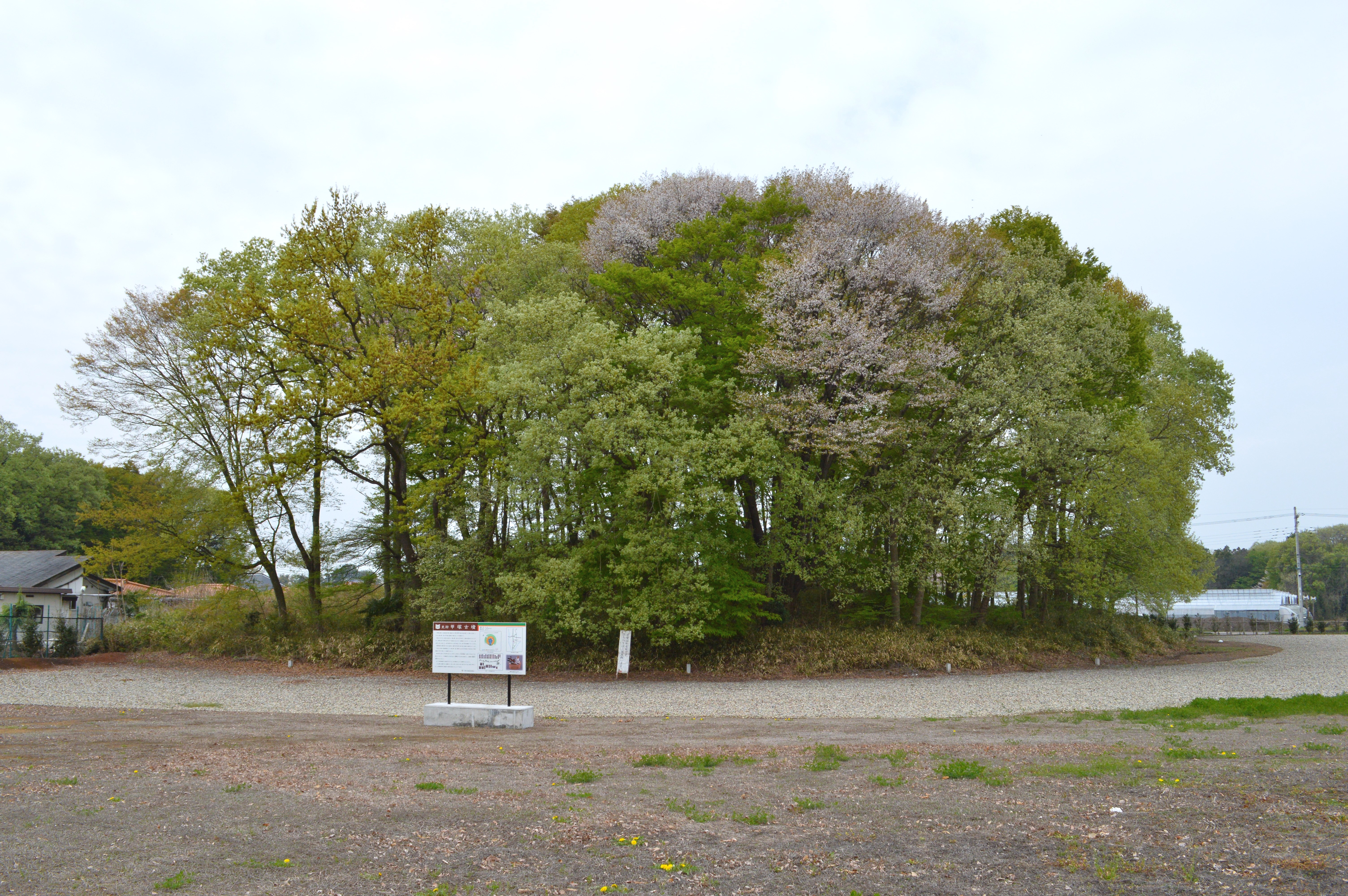 甲塚古墳 (下野市) 全景